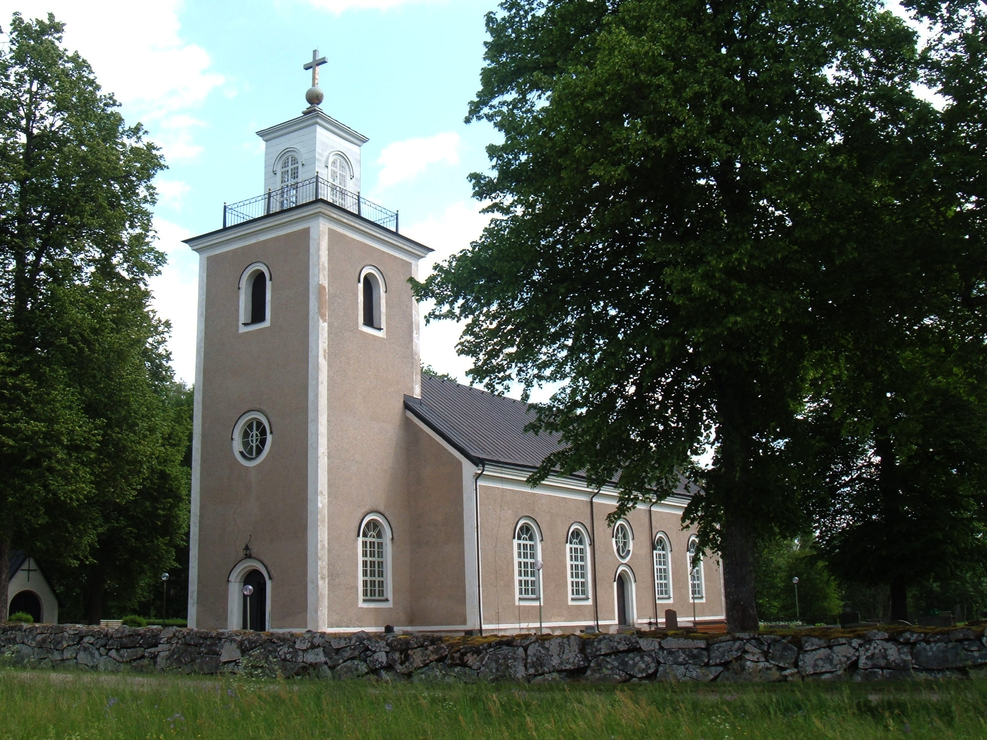 Gunnilbo kyrka